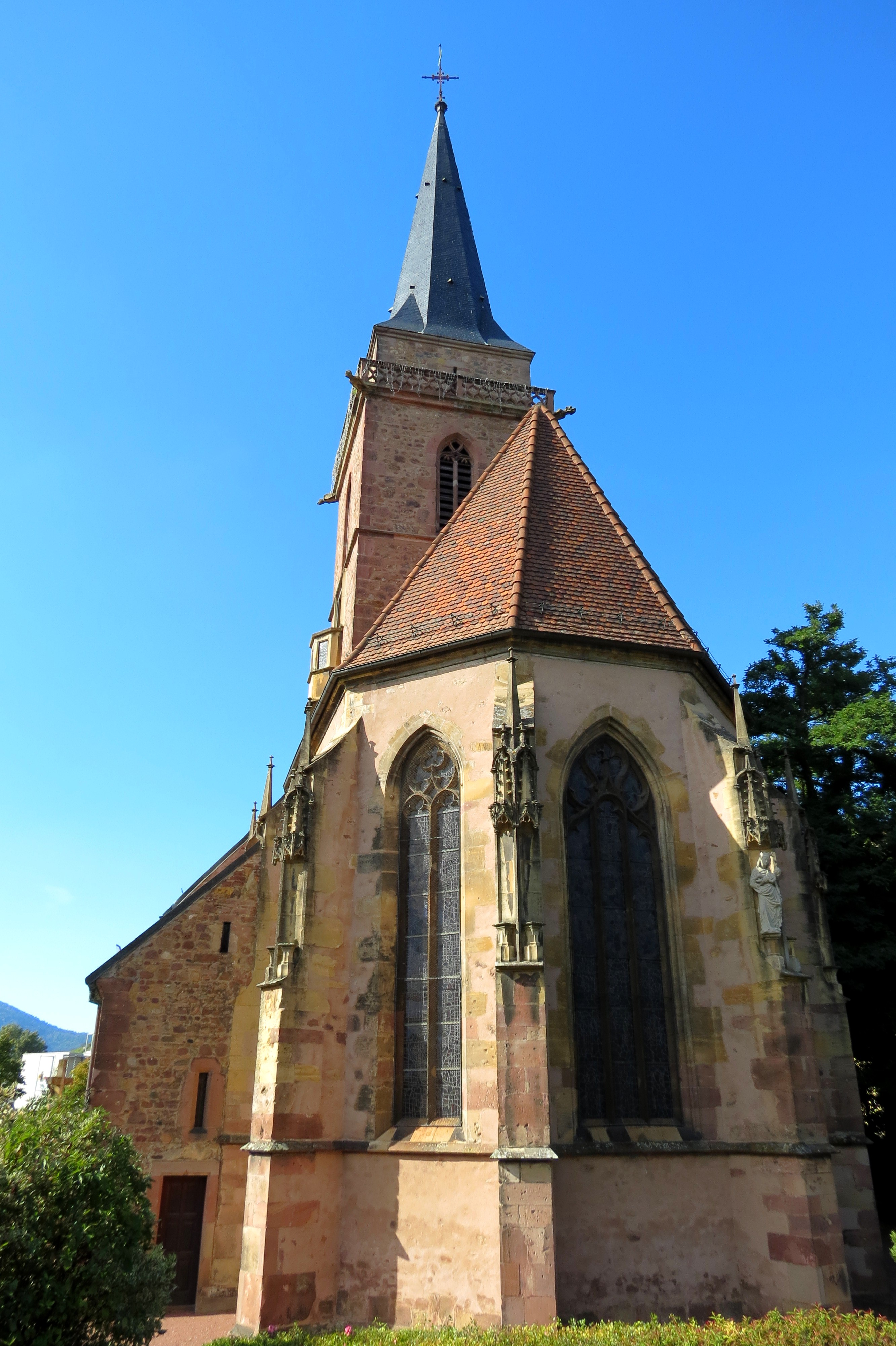 Vieux-Thann (68), église Saint-Dominique. This building is en partie classé, en partie inscrit au titre des Monuments Historiques.